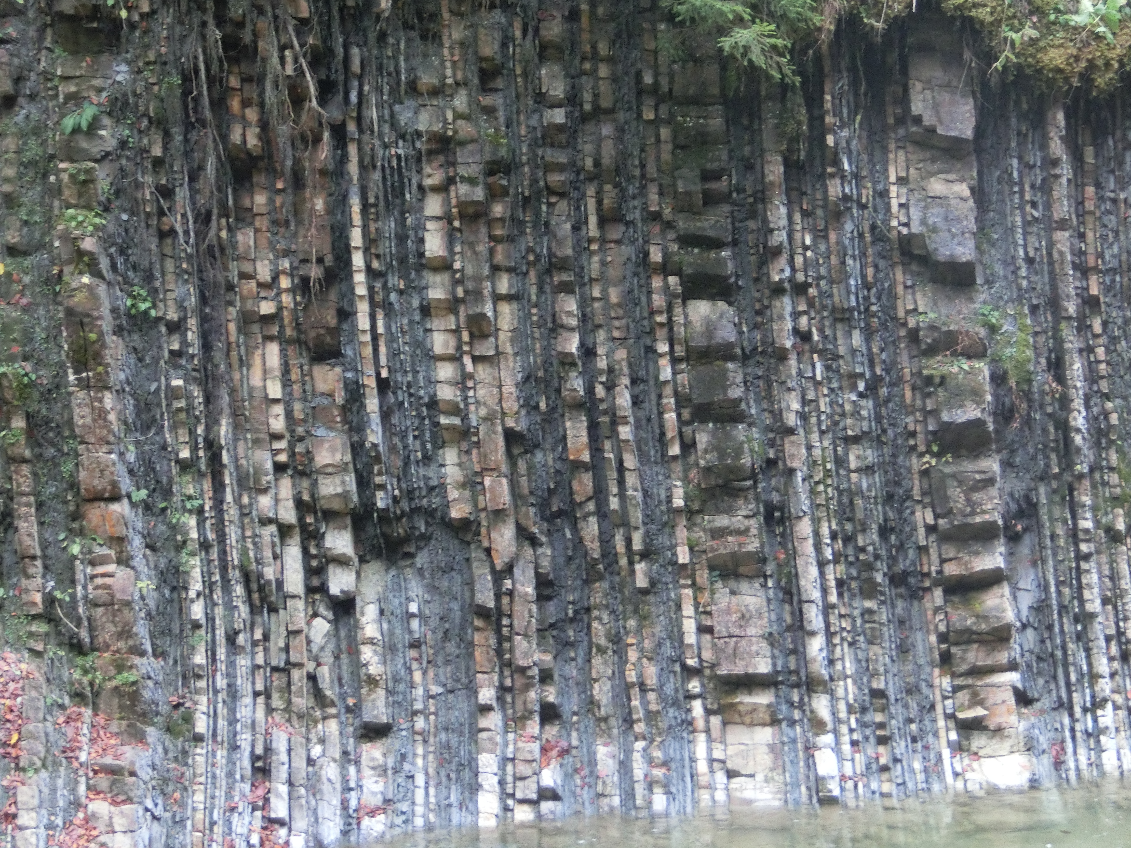 Gütesiegel: "Schönste Geotope Bayerns"